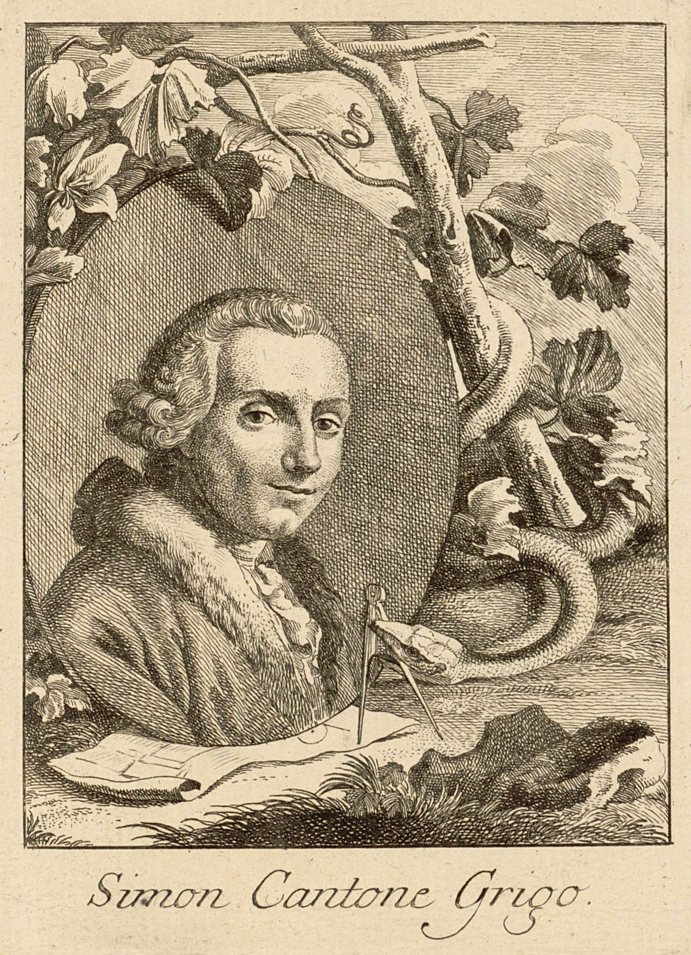 Porträt des Architekten Simone Cantoni publiziert 1774